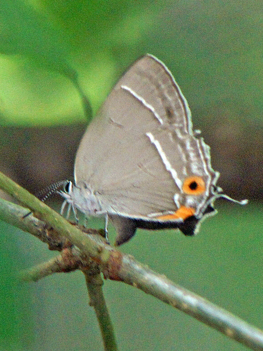 オオミドリシジミのメス